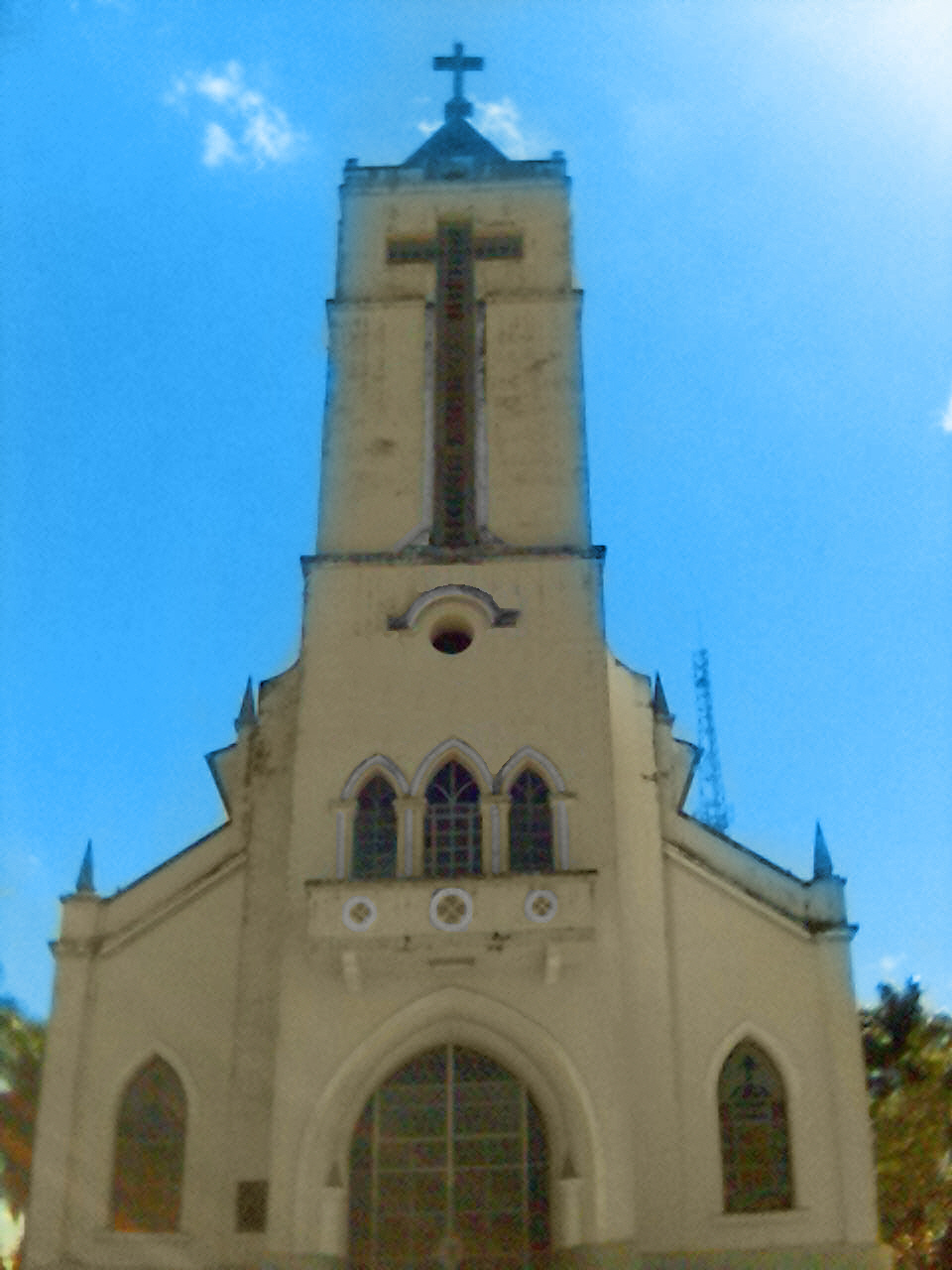 Igreja Matriz Santo Antônio